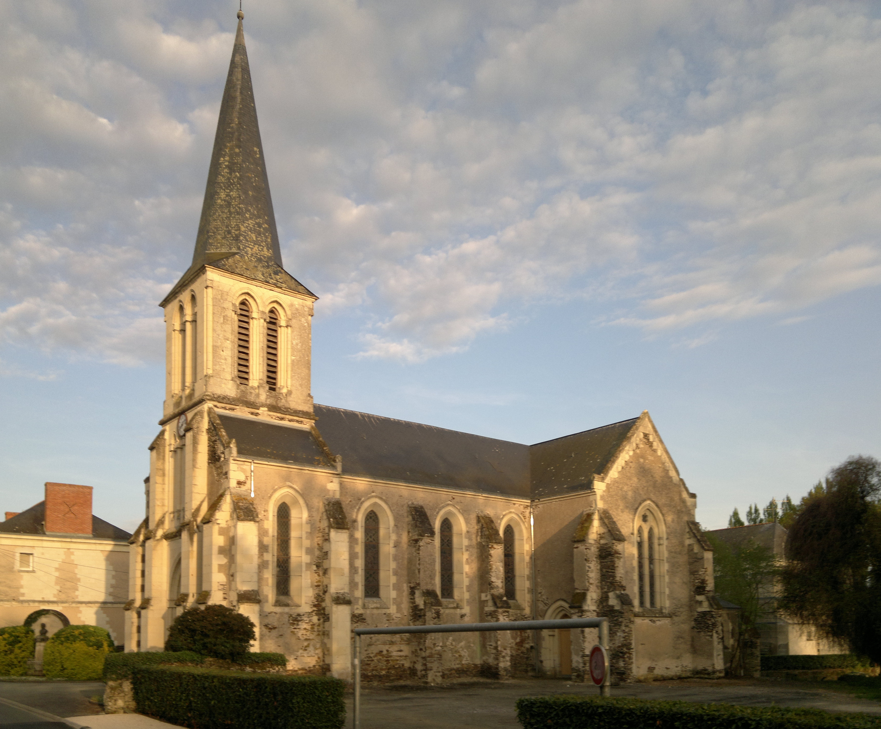 Église Saint-Jean, Fr-49-Saint-Jean-de-la-Croix.